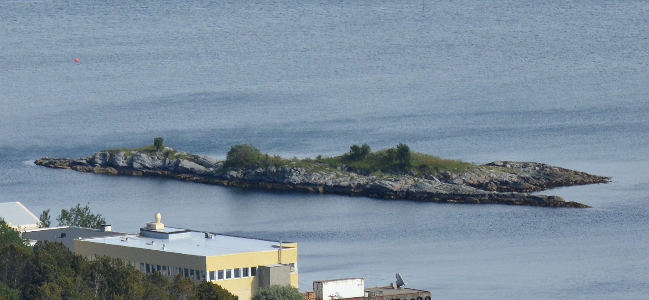 Lampeholmen